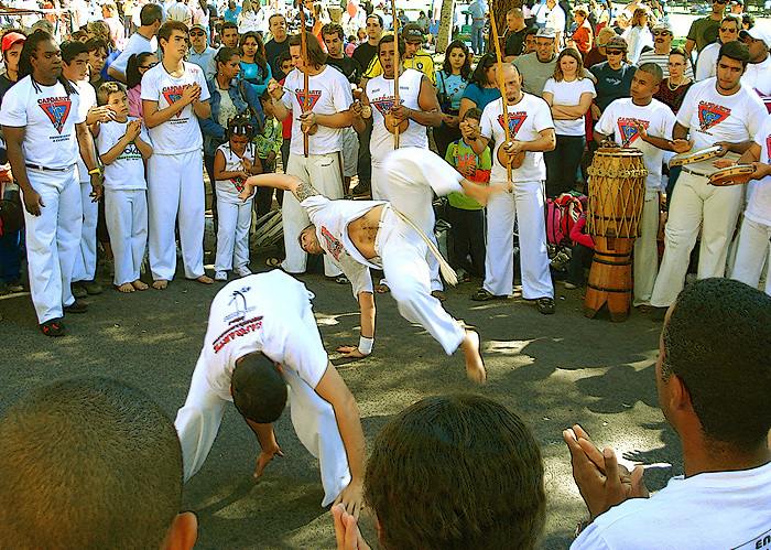 Roda de capoeira no Parque da Redenção, Porto Alegre, Brasil.